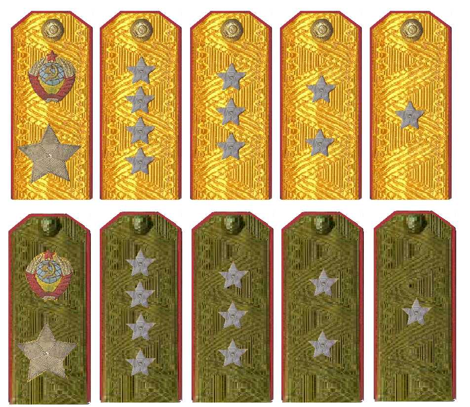 погоны генералов